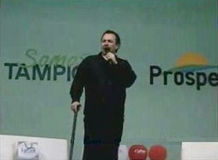 Actro de doblaje Salvador Delgado imitando al Doctor House en conferecia de animé en Tampico, México.